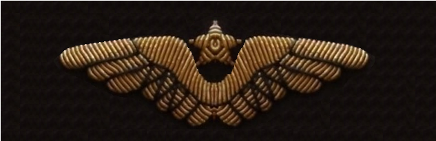 летный знак